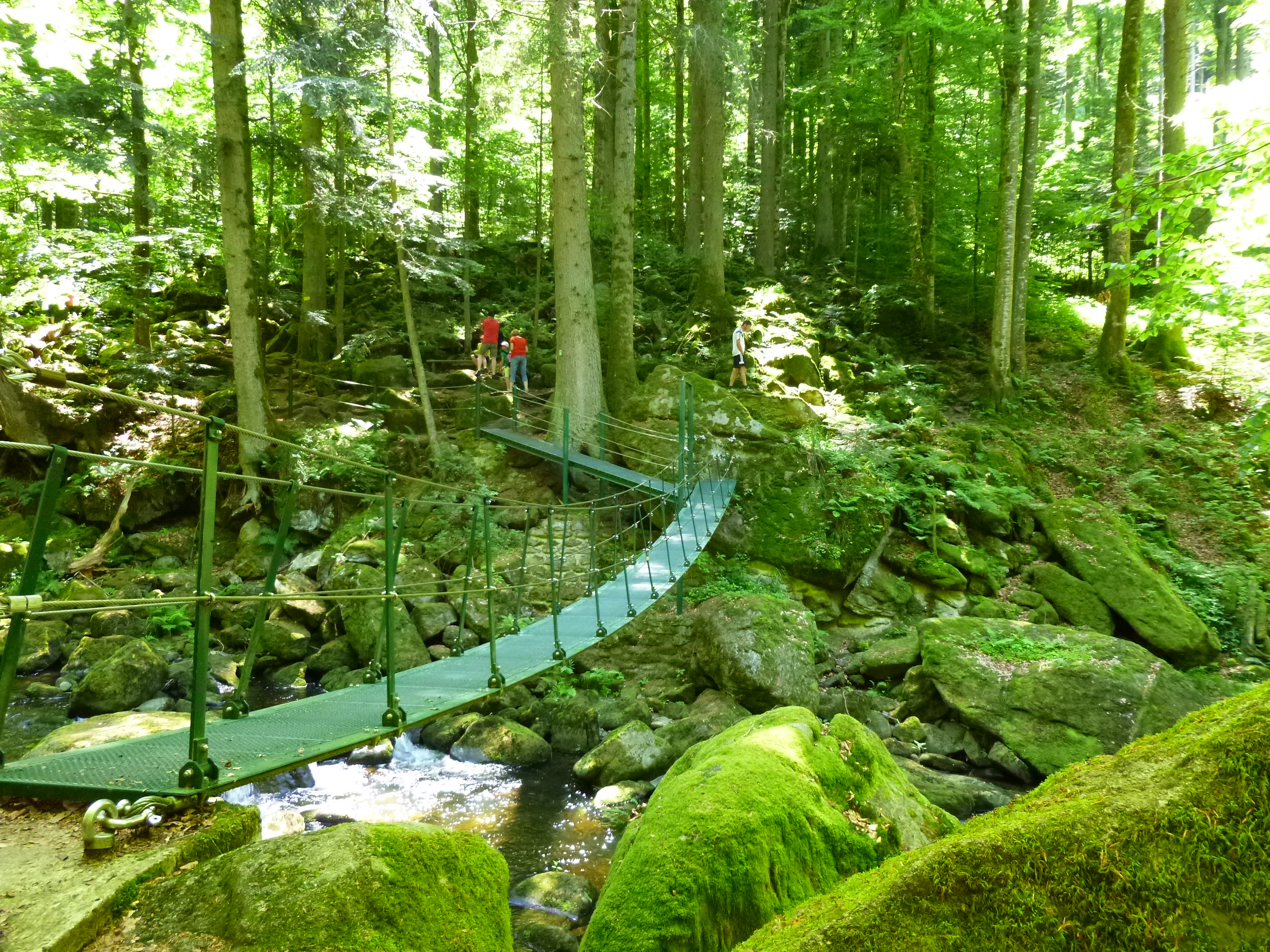 Hängebrücke in der Buchberger Leite unweit von Ringelai; sie wurde ursprünglich für die Arbeiter des Carbid Werkes gebaut, um den Weg zur Arbeit zu verkürzenLandschaftsschutzgebiet "Buchberger Leite"